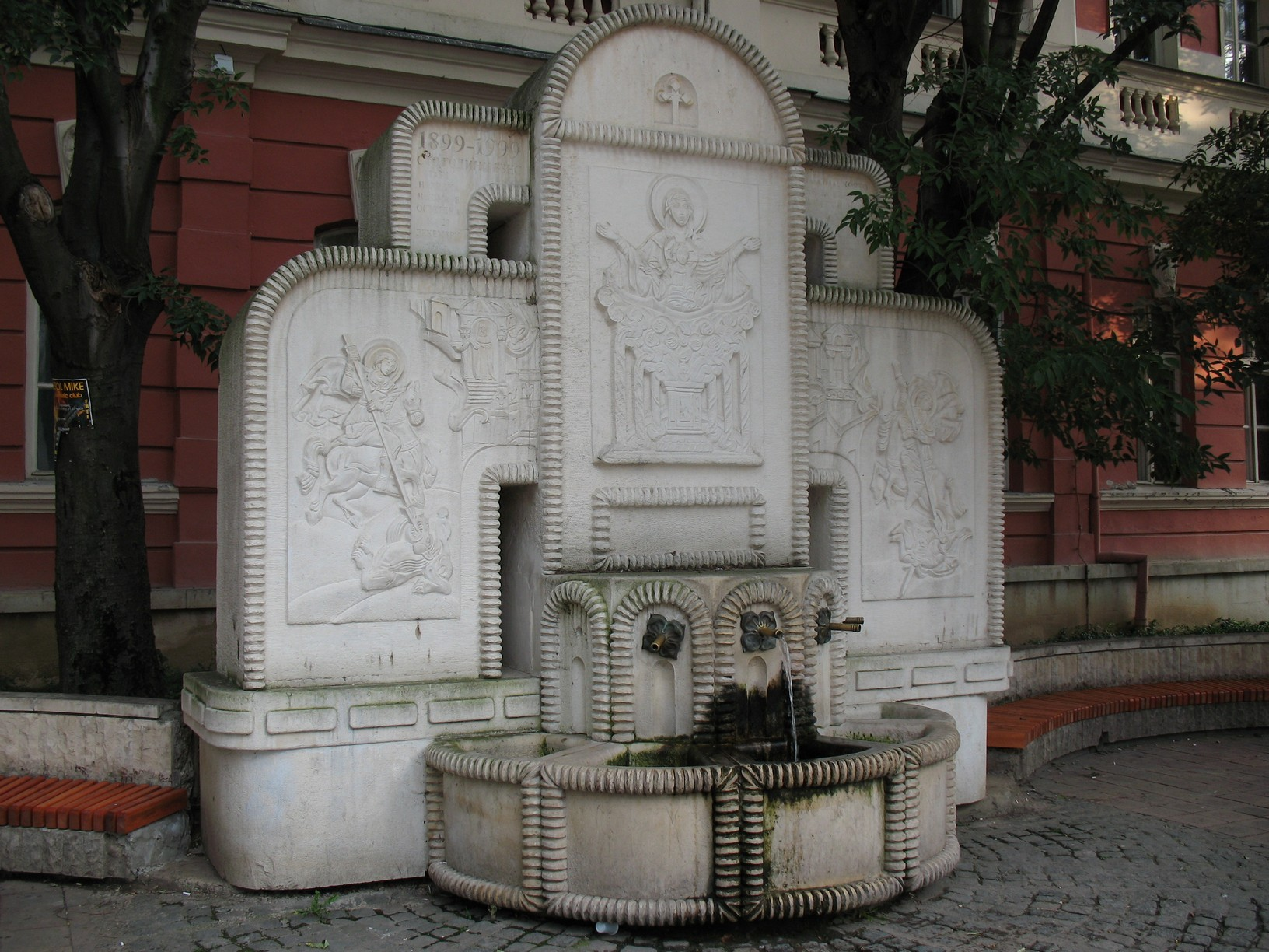 Pleven